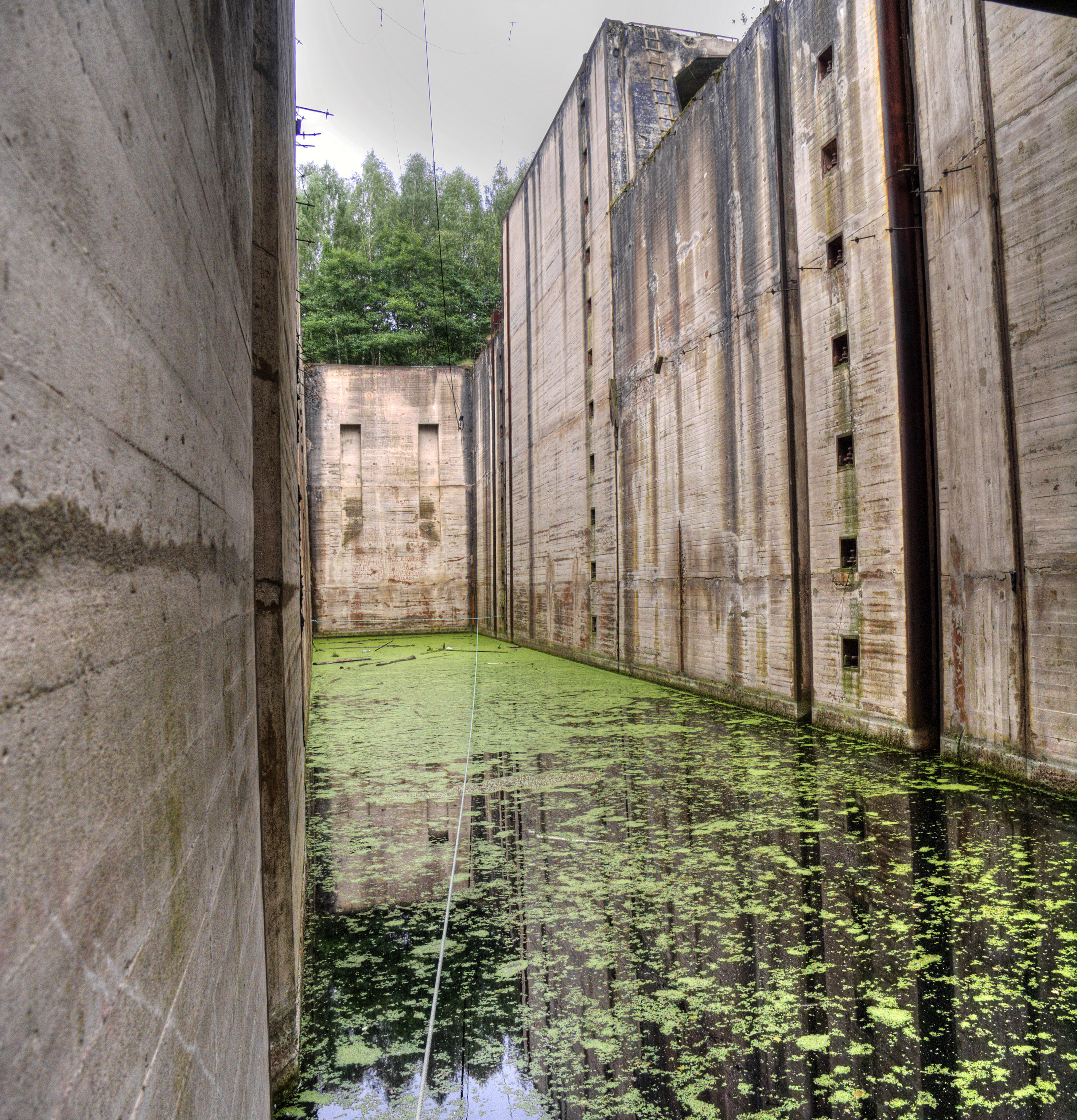 Nieukończona śluza na Kanale Mazurskim w Leśniewie Górnym